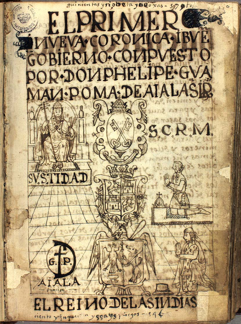 Primera página de la edición autógrafa del Primer nueva corónica y buen gobierno de Felipe Guamán Poma de Ayala